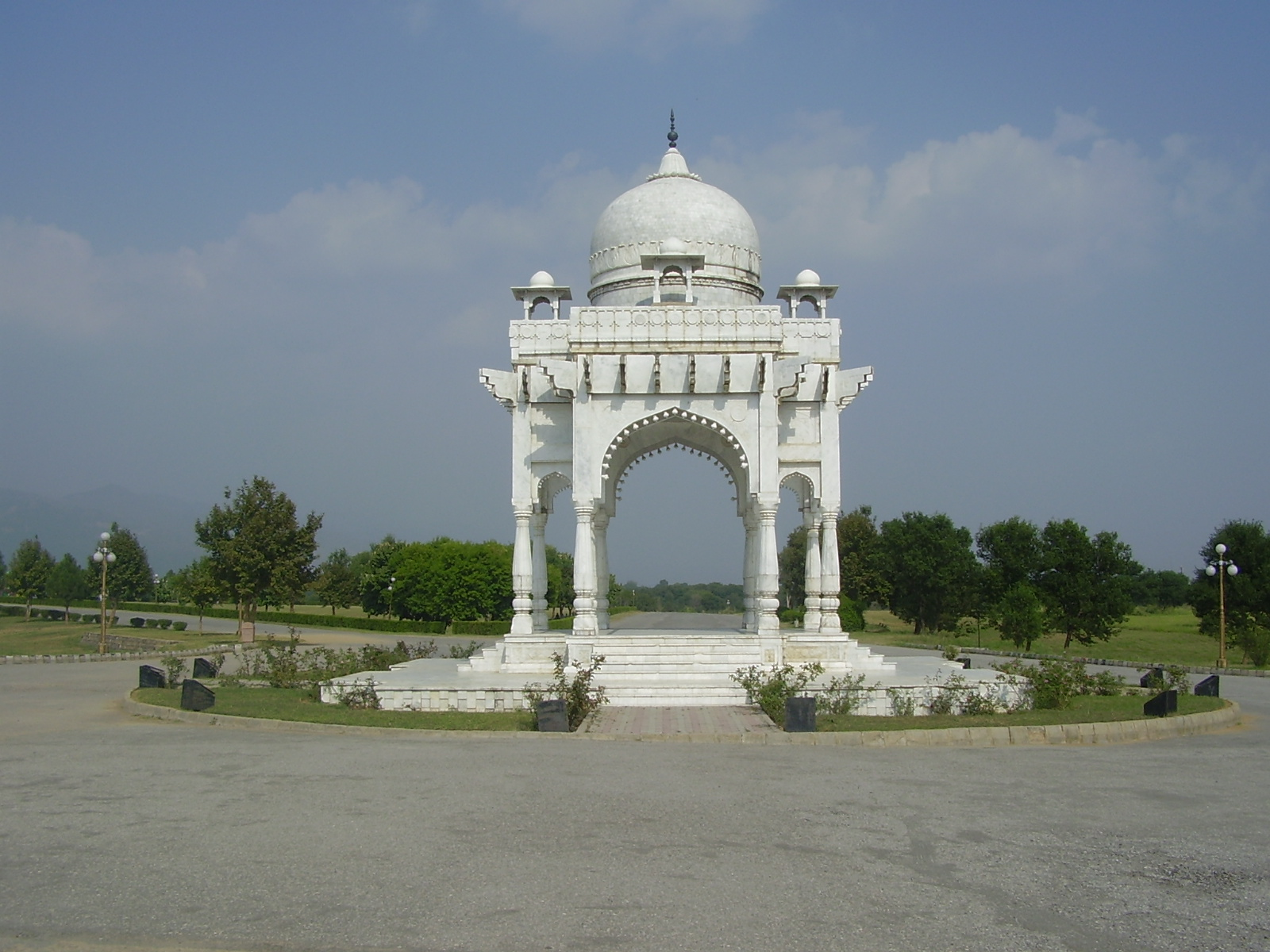 Pavilion in Fatima Jinnah Park, in Islamabad, Pakistan.